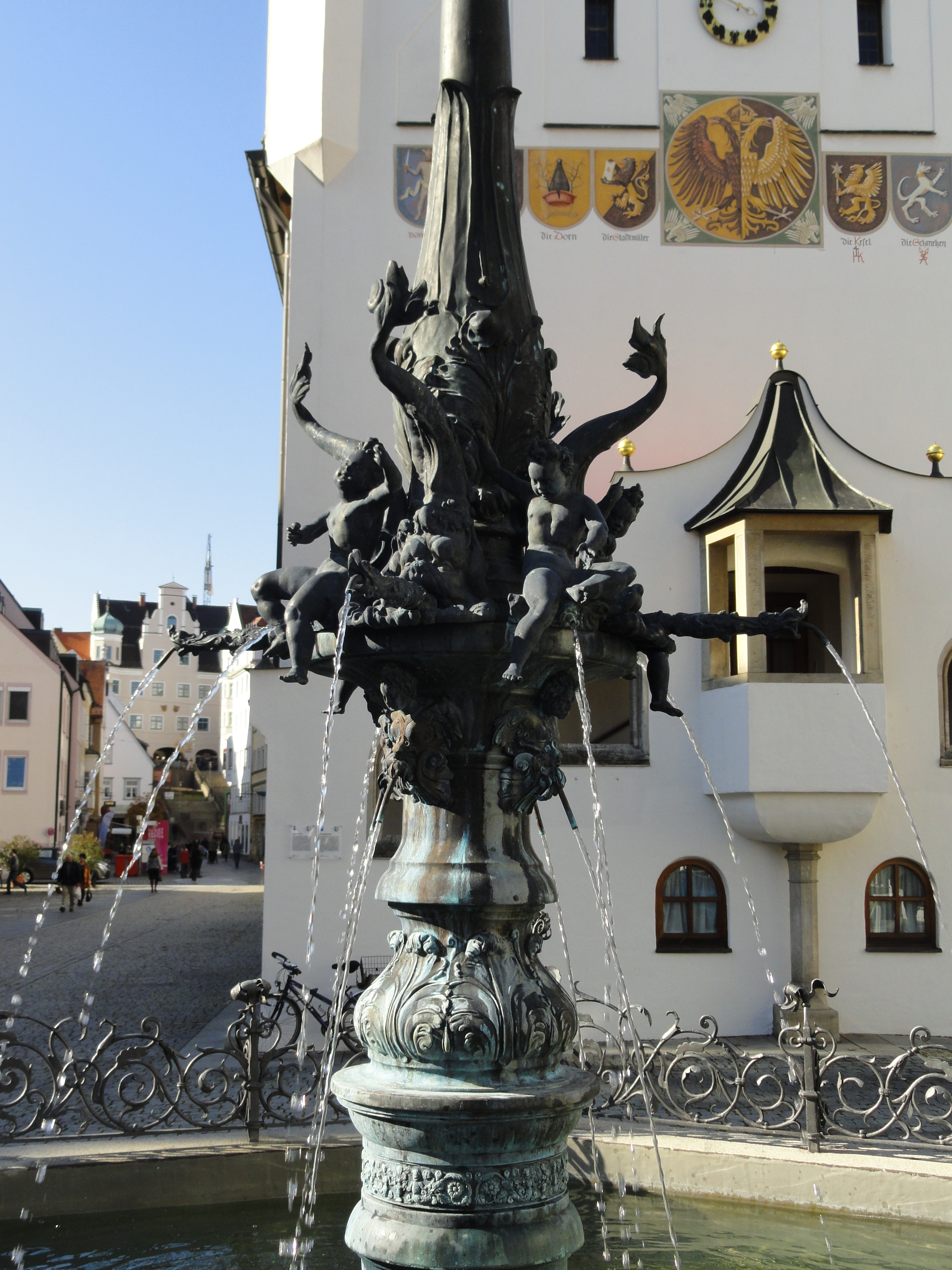 Detail der Brunnensäule am Rathaus in Kempten: Wasserspeiende Delfine und Putten mit Akanthusblättern